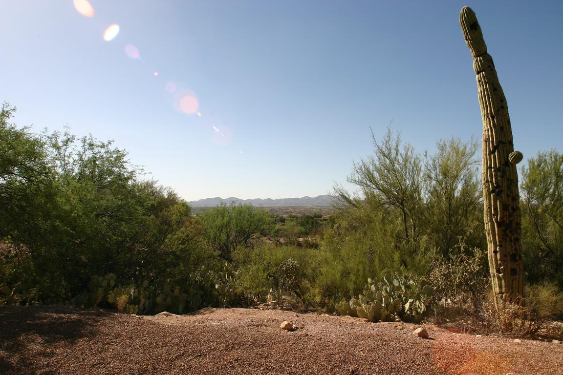 Arizona desert